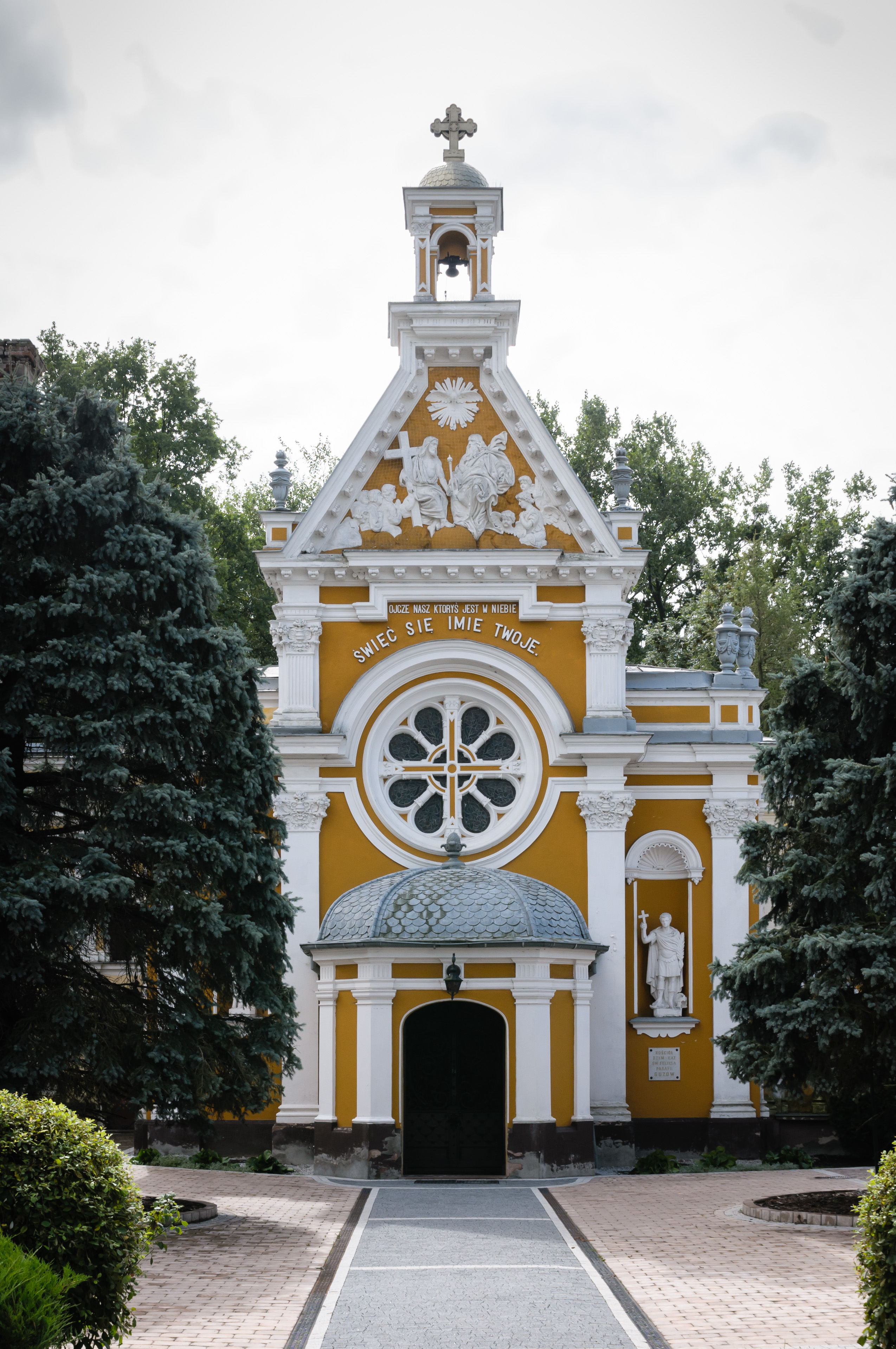 Guzów, zespół pałacowy, XIX